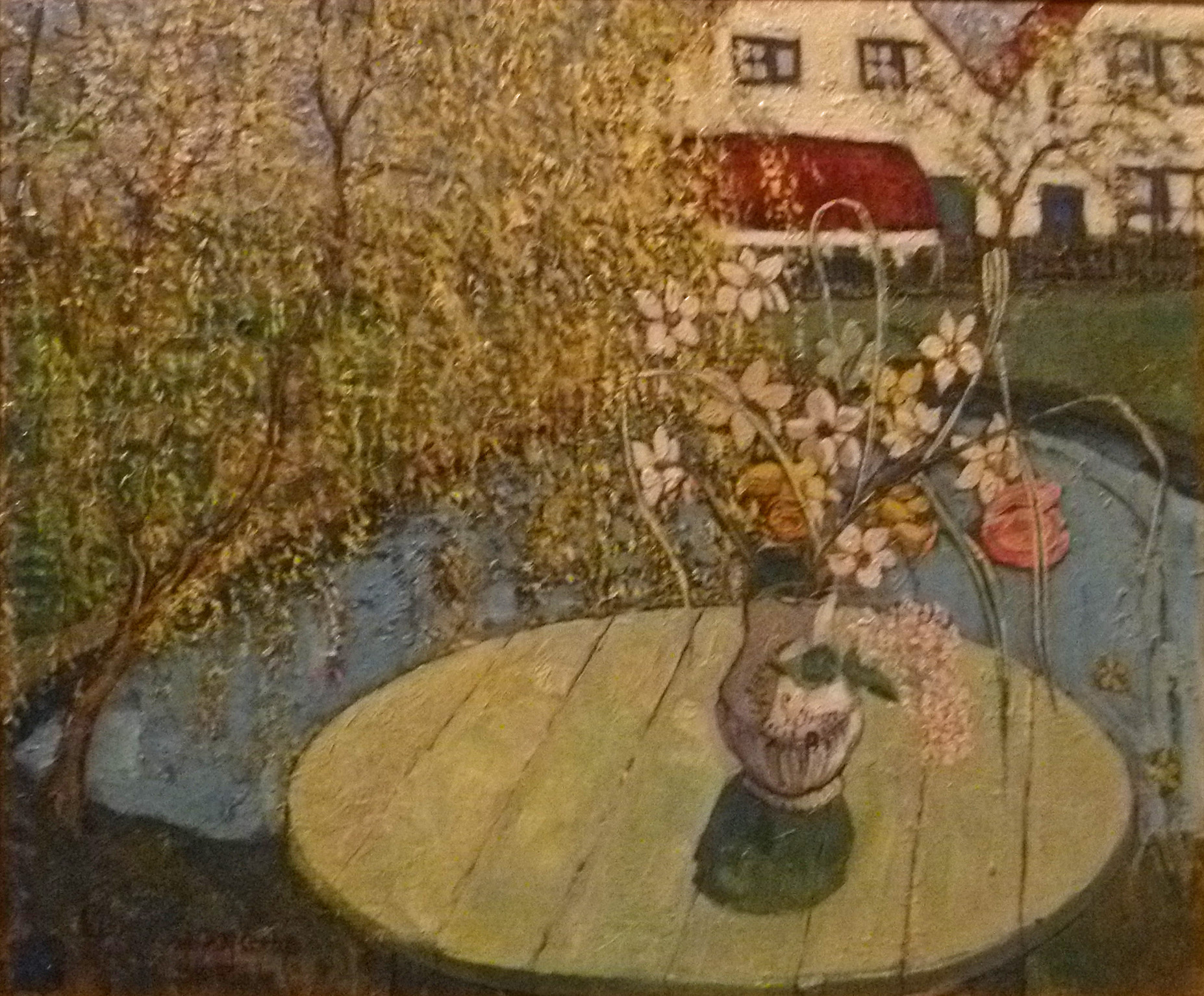 "Bloemenvaas met zicht op Graaf Jansdijk" , olie op doek (75 x 90 cm) door de Belgische kunstschilder Pierre Henri Bayaux (1884-1946); privéverzameling